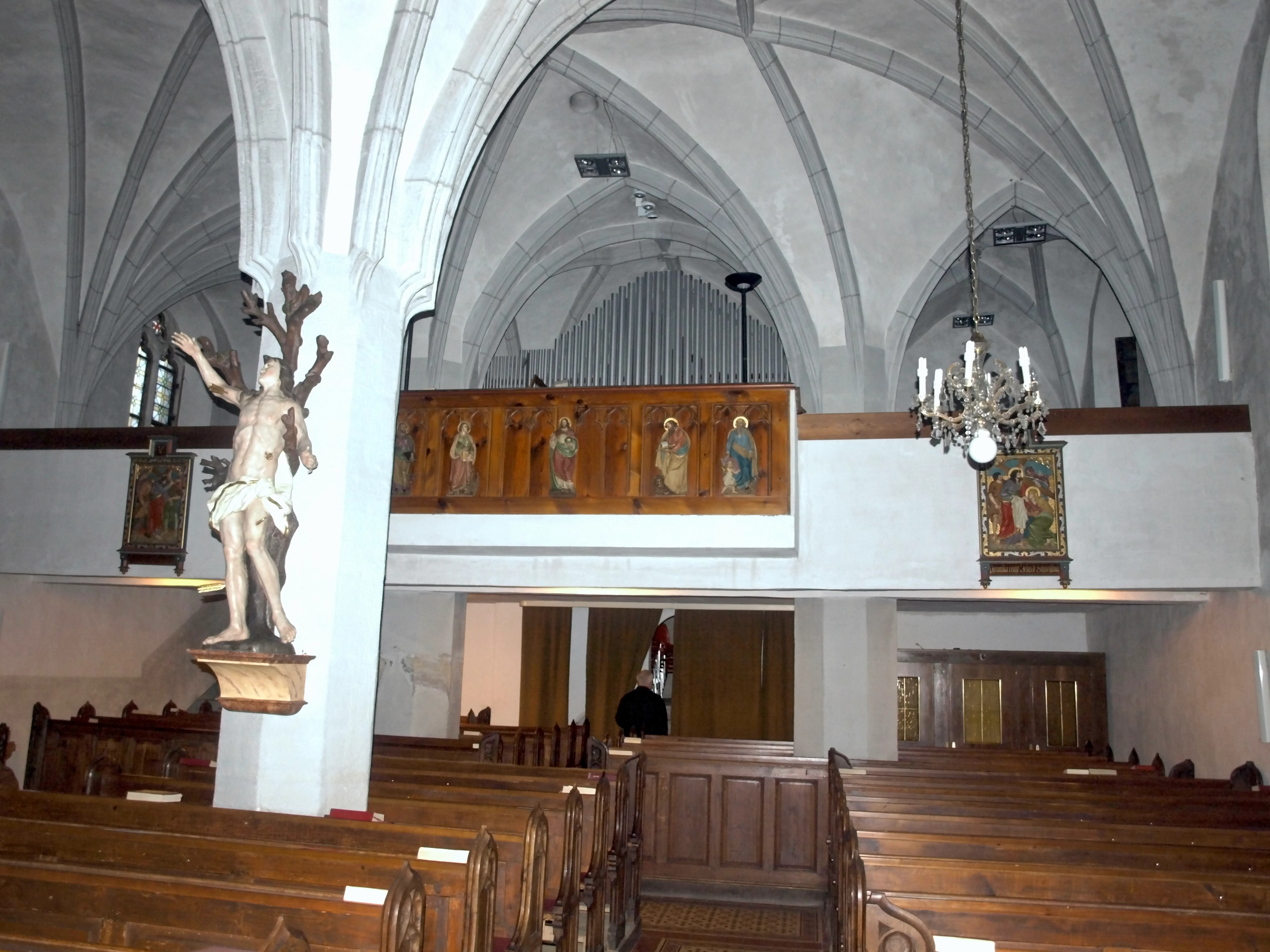 Kath. Pfarrkirche hl. Pantaleon